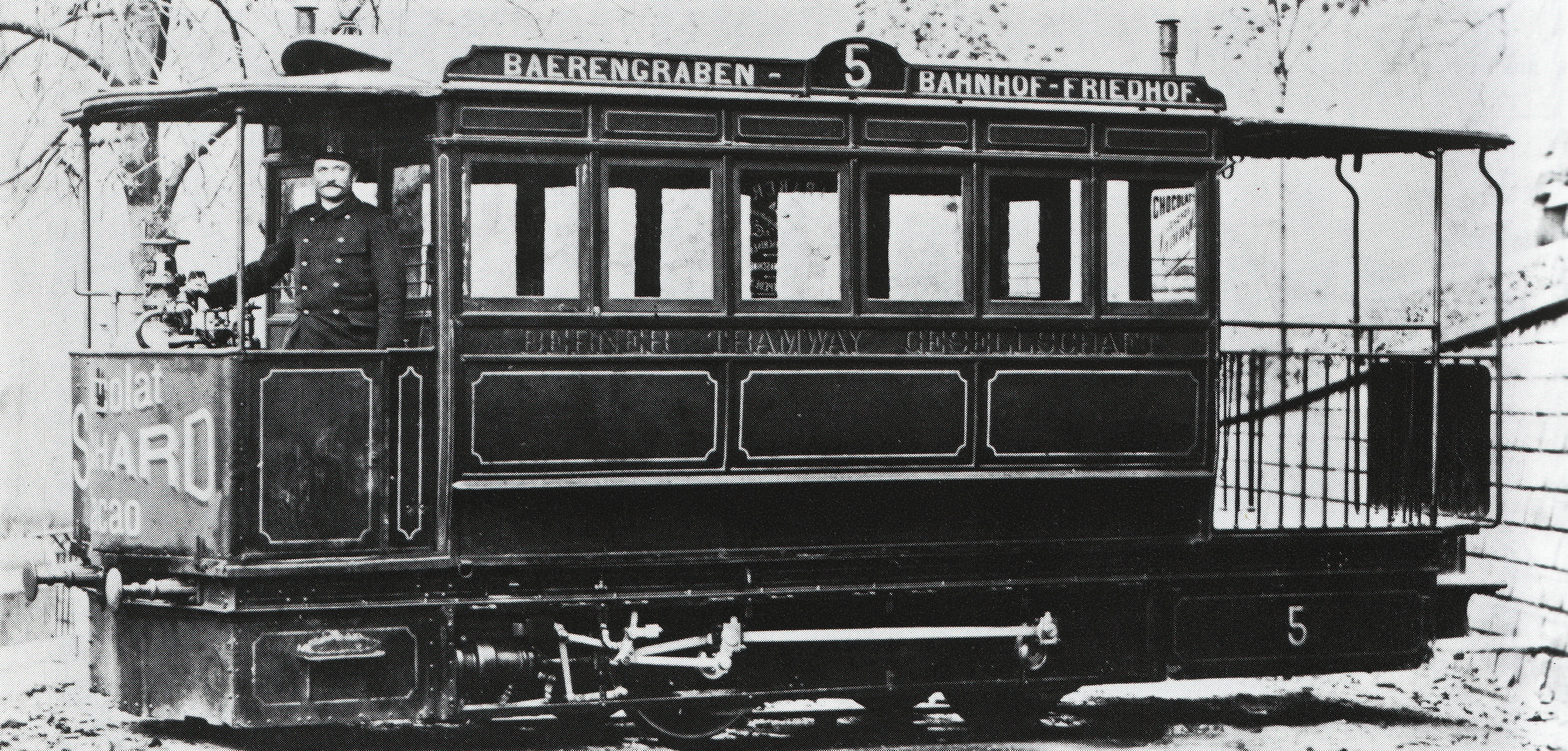 Druckluft-Triebwagen Nr. 5 Berner Tramway-Gesellschafft, gebaut 1890 inn Ludwigs & Schopfers Machines-Fabrique zu Bern nach Plänen von Louis Mékarski, 1901 außer Dienst gestellt und anschließend abgebrochen.